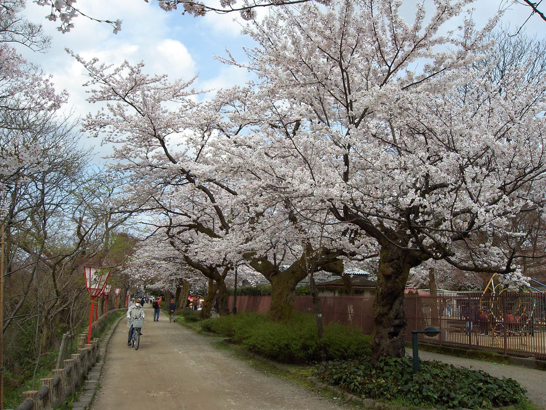 桜。高岡古城公園 (日本、富山県高岡市)にて。 / A cherry (Prunus sp.) in Takaoka Kojō Park (Takaoka-city, Toyama, Japan)